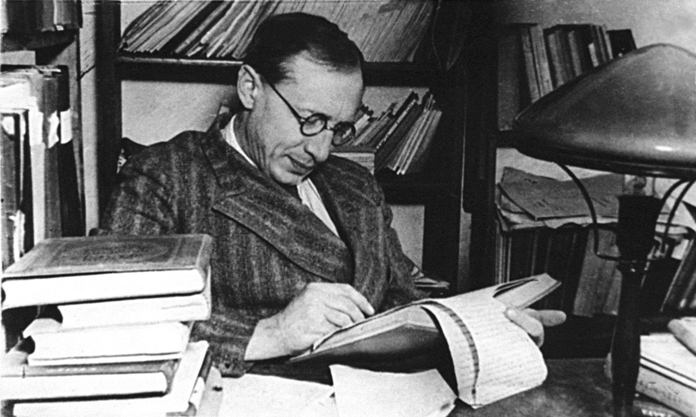 Николай Григорьевич Чеботарёв, один из крупнейших советских математиков